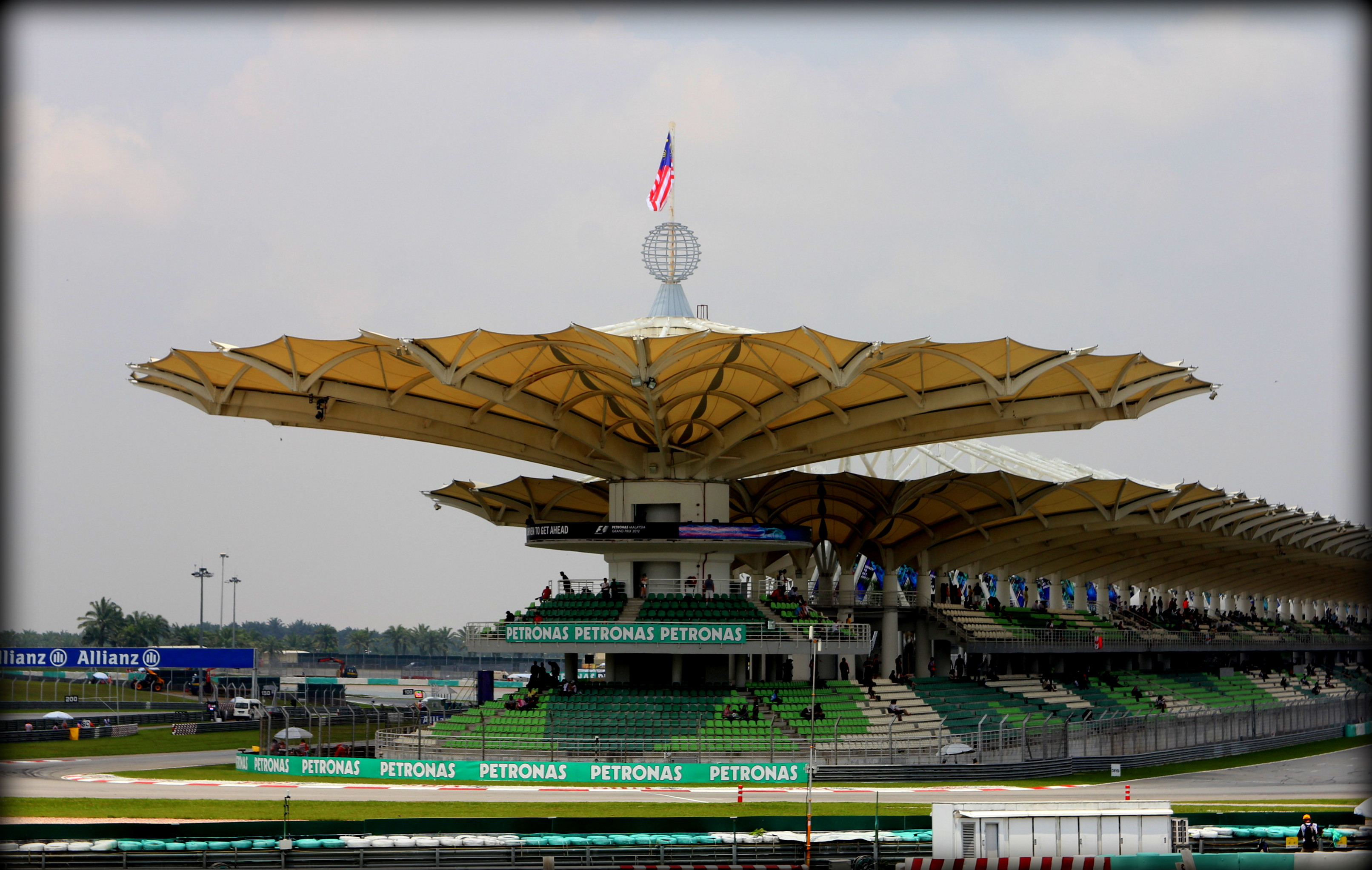 Khán đài Trường đua F1 tại Sepang, Malaysia